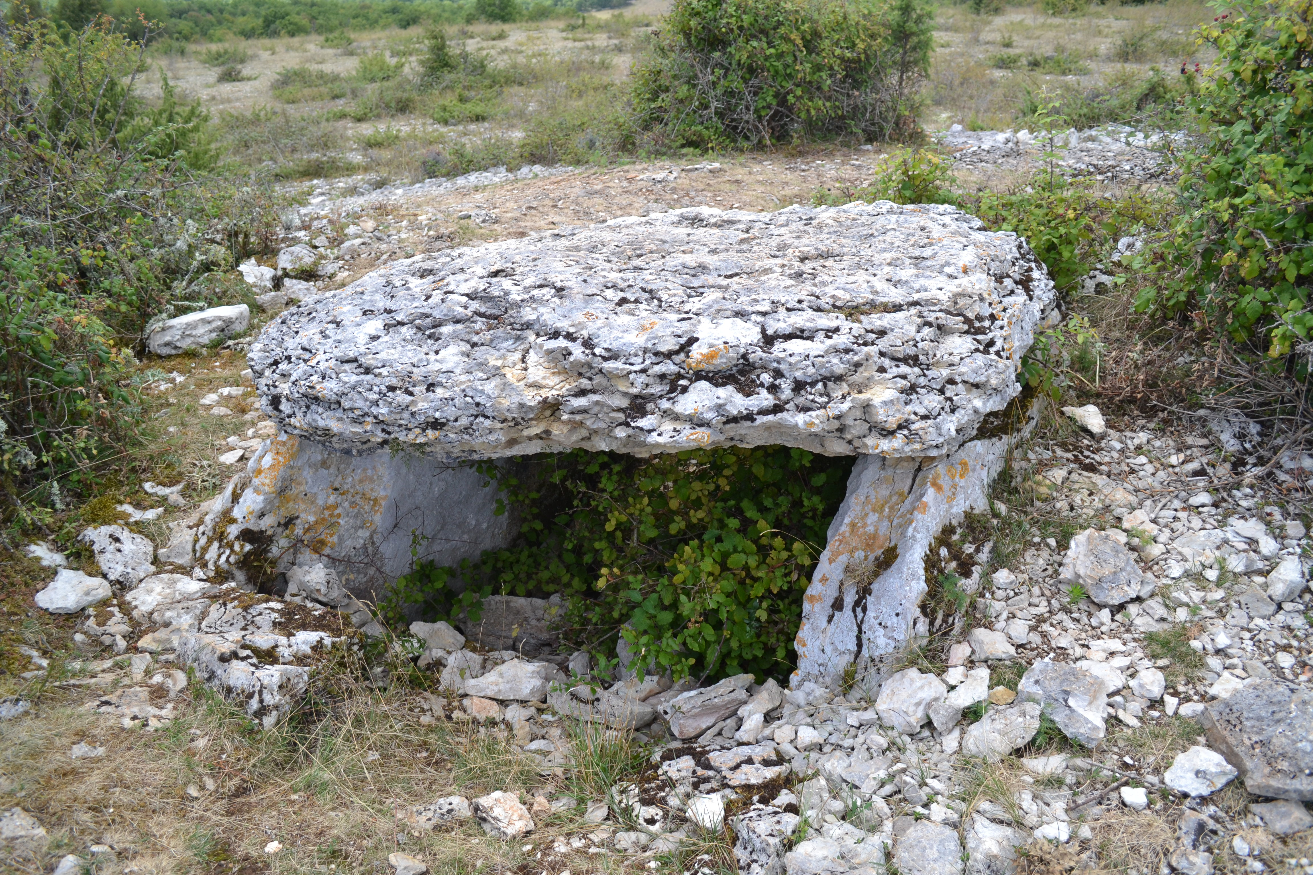 Dolmen 1, Pech Laglayre, Gréalou, Lot, France